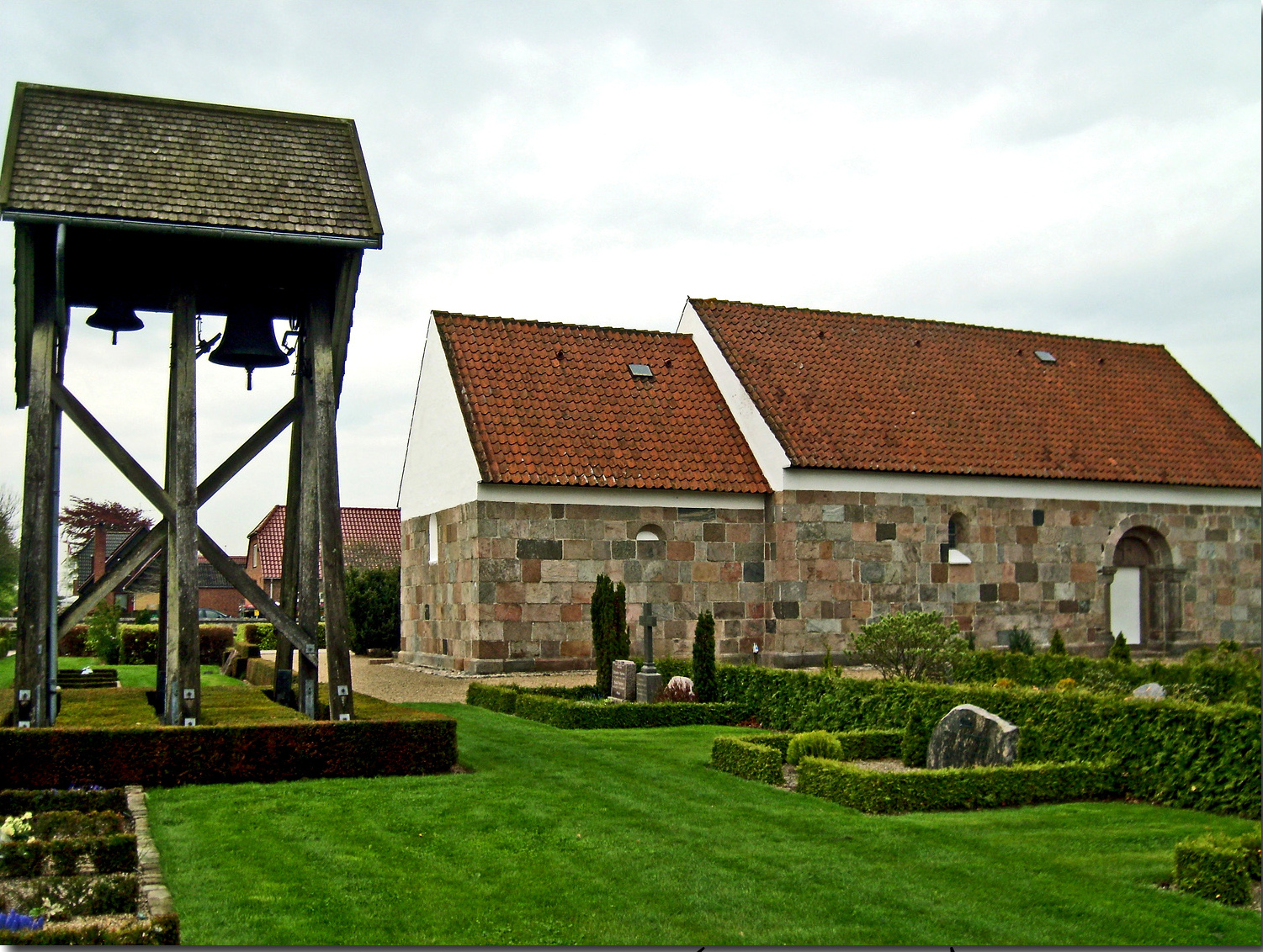 fra nordøst